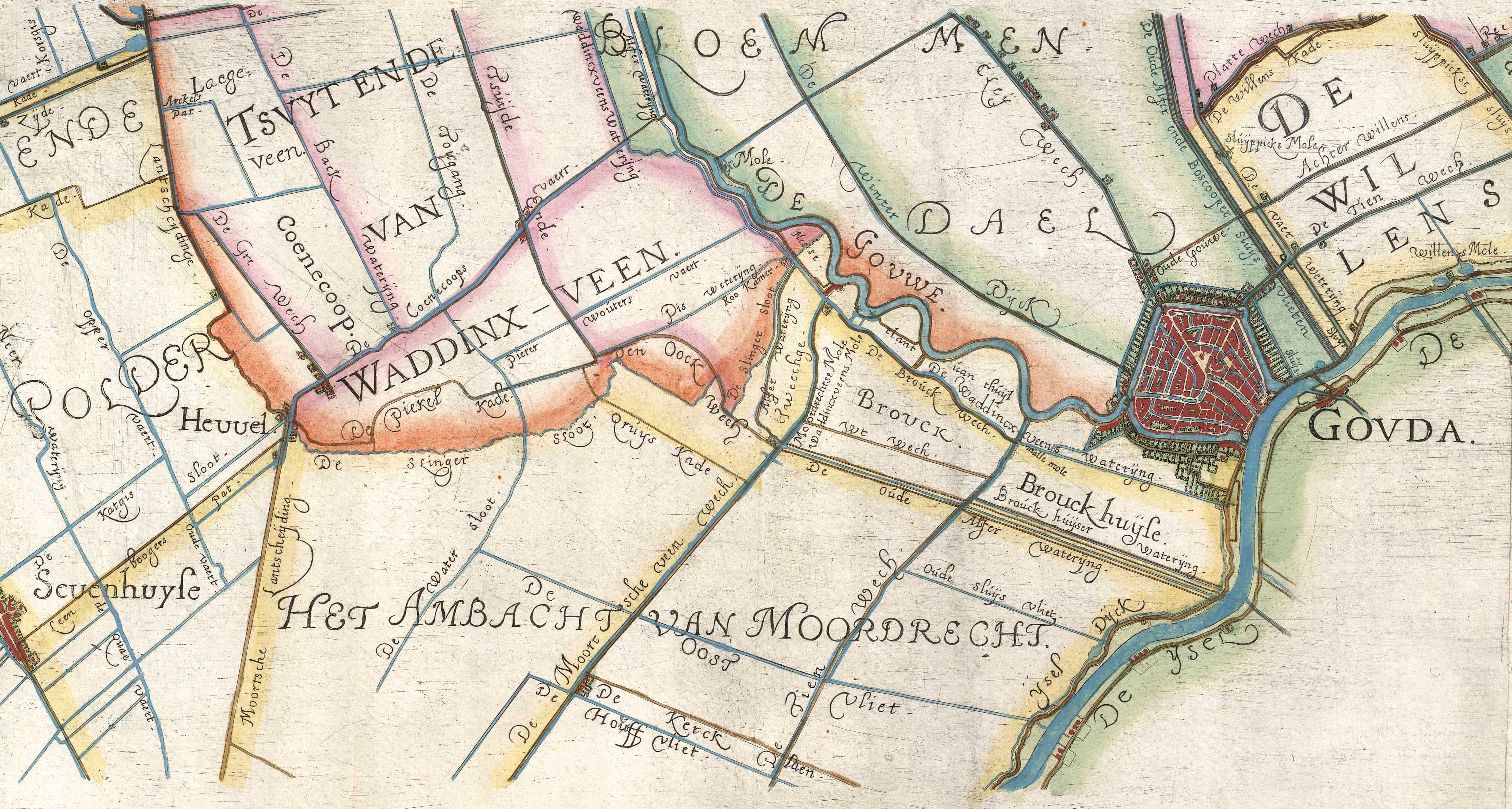 A-4082 [Kaart van het hoogheemraadschap van Rijnland : Gouda], 1615